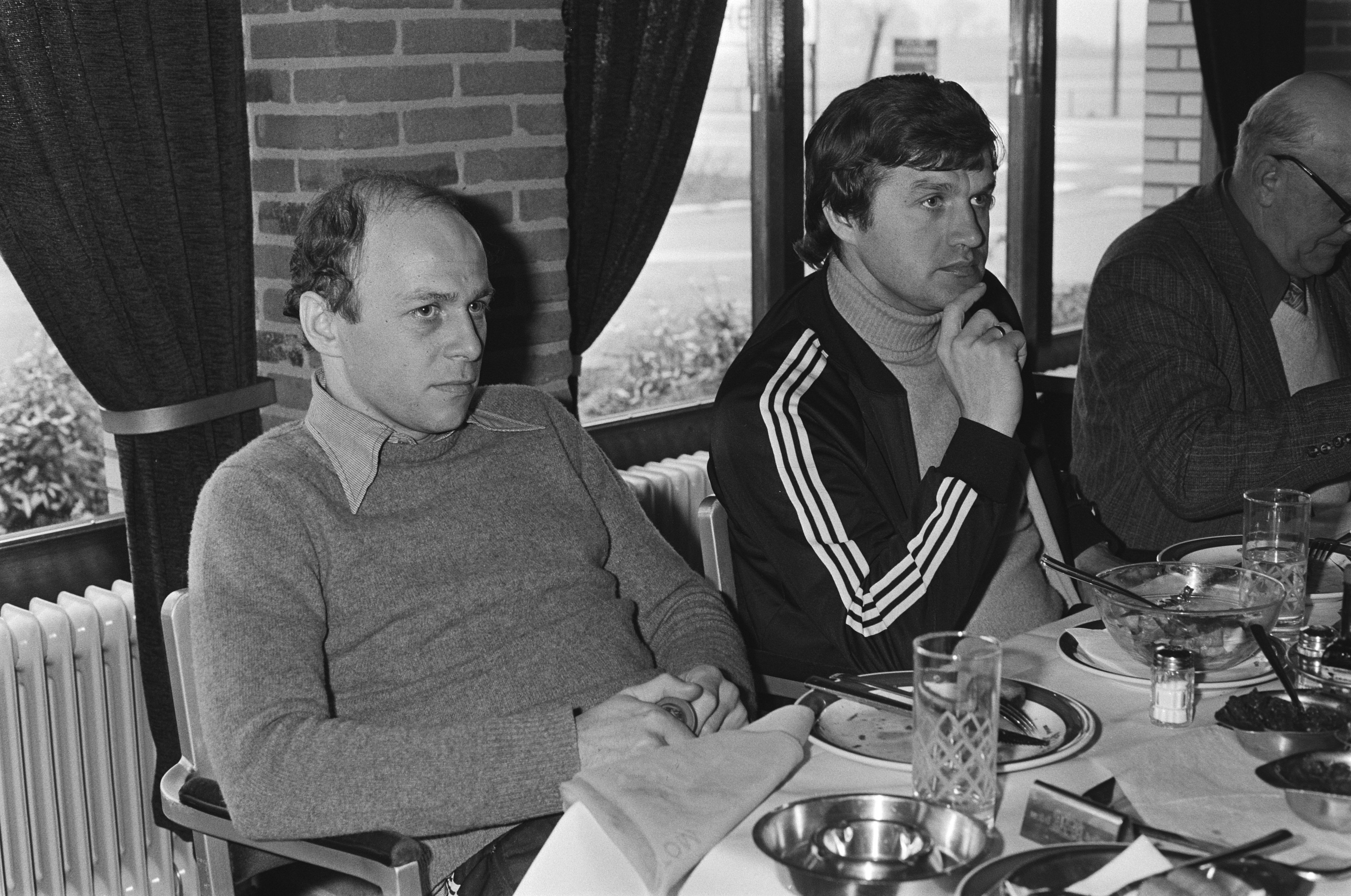 Collectie / Archief : Fotocollectie Anefo Reportage / Serie : [ onbekend ] Beschrijving : Belgische voetbalclub Lokeren in Nederland, Europacup-III wedstrijd tegen AZ67, Lato (l) en Lubanski tijdens lunch na aankomst in Nederland Datum : 3 maart 1981 Trefwoorden : lunches, sport, voetbal Instellingsnaam : Europa Cup Fotograaf : Antonisse, Marcel / Anefo Auteursrechthebbende : Nationaal Archief Materiaalsoort : Negatief (zwart/wit) Nummer archiefinventaris : bekijk toegang 2.24.01.05 Bestanddeelnummer : 931-3523